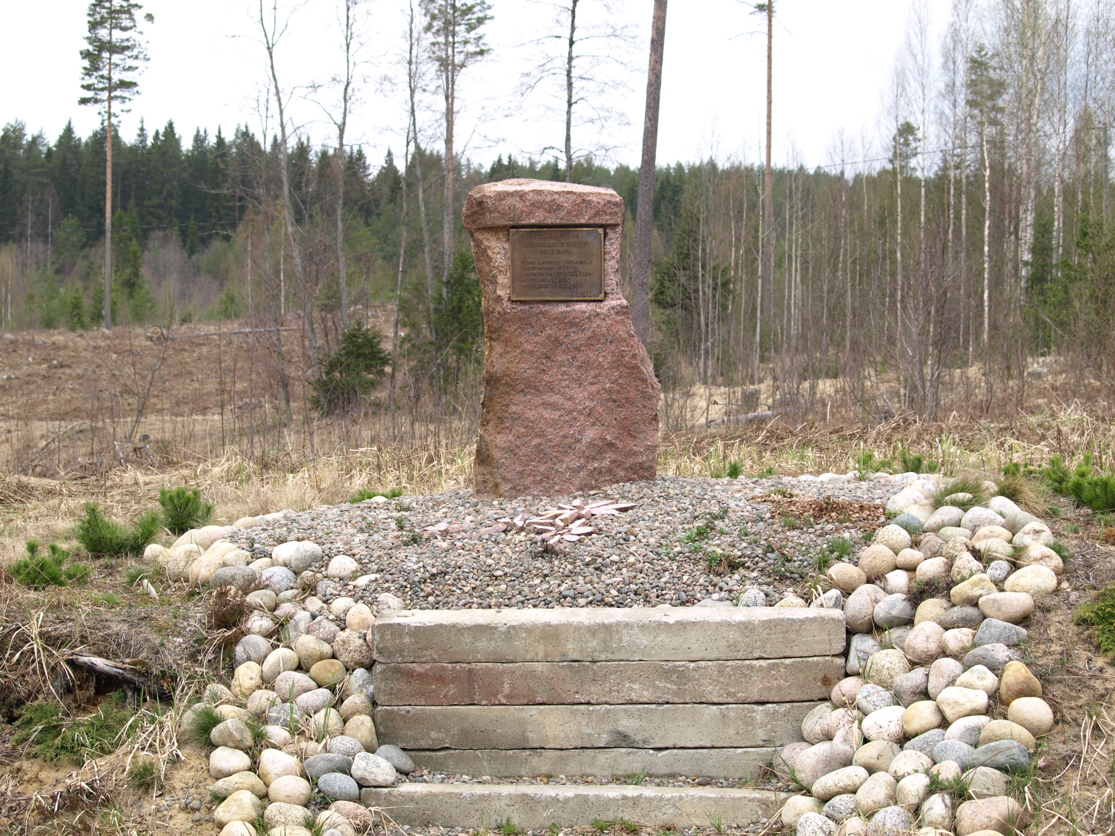 Kutujoen taistelun 1808 muistomerkki